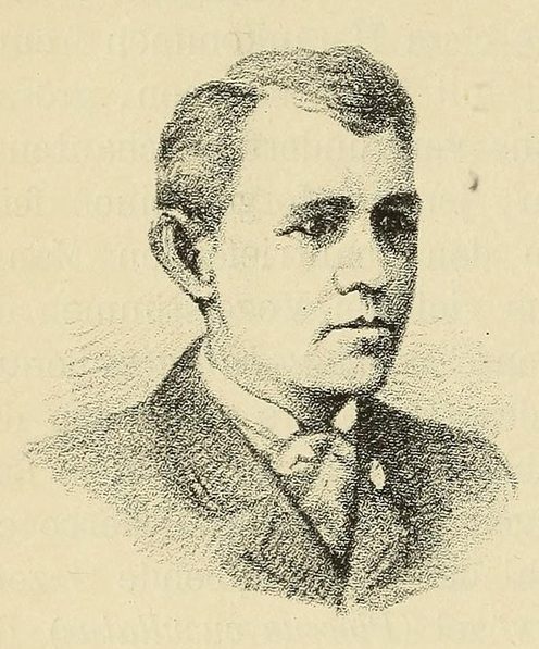 Vol.1 Illustration